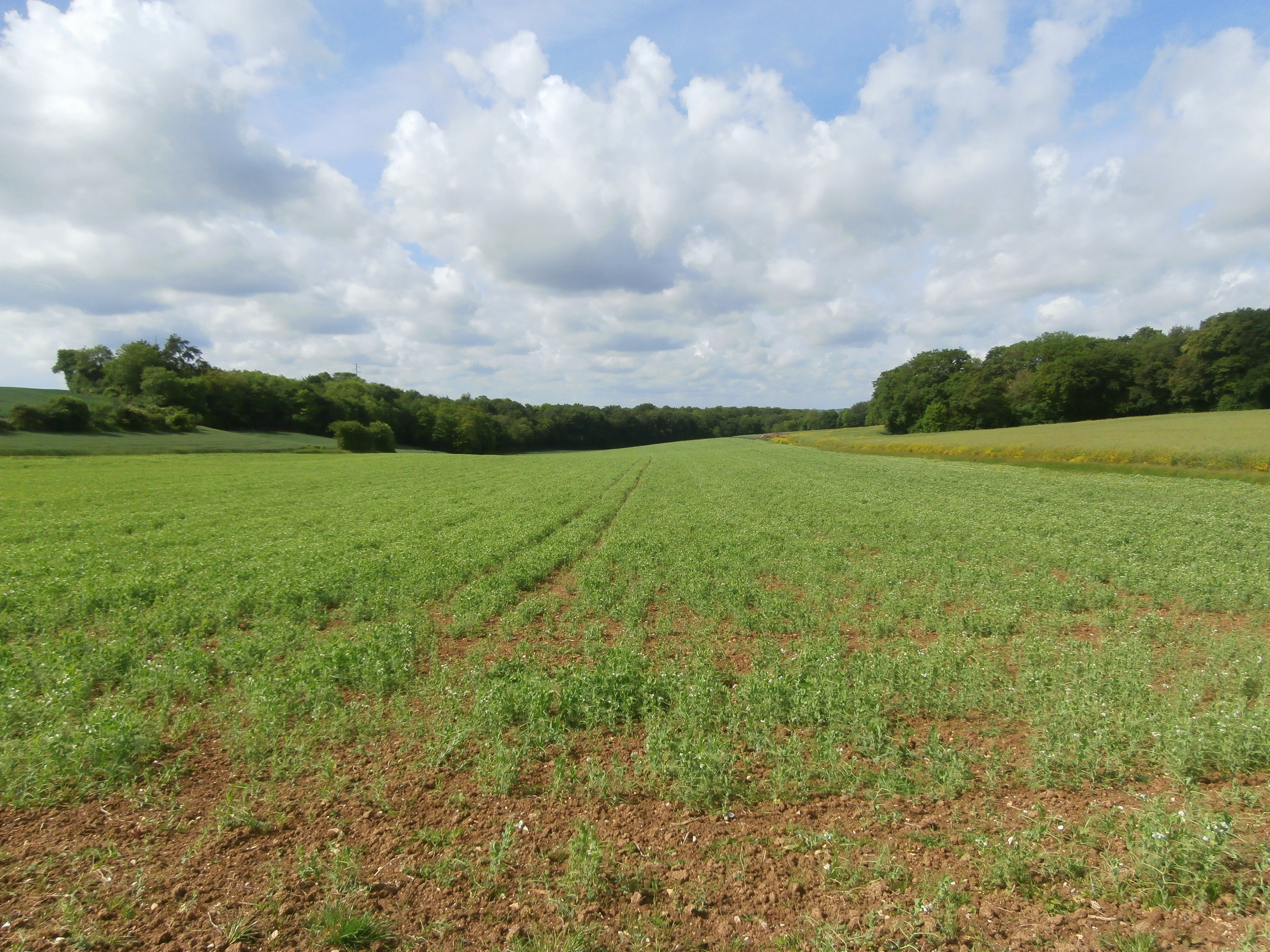 Vue aval de la fosse du bailly, en amont de la vallée Tortue, commune de Saint-Aubin-sous-Erquery (60).